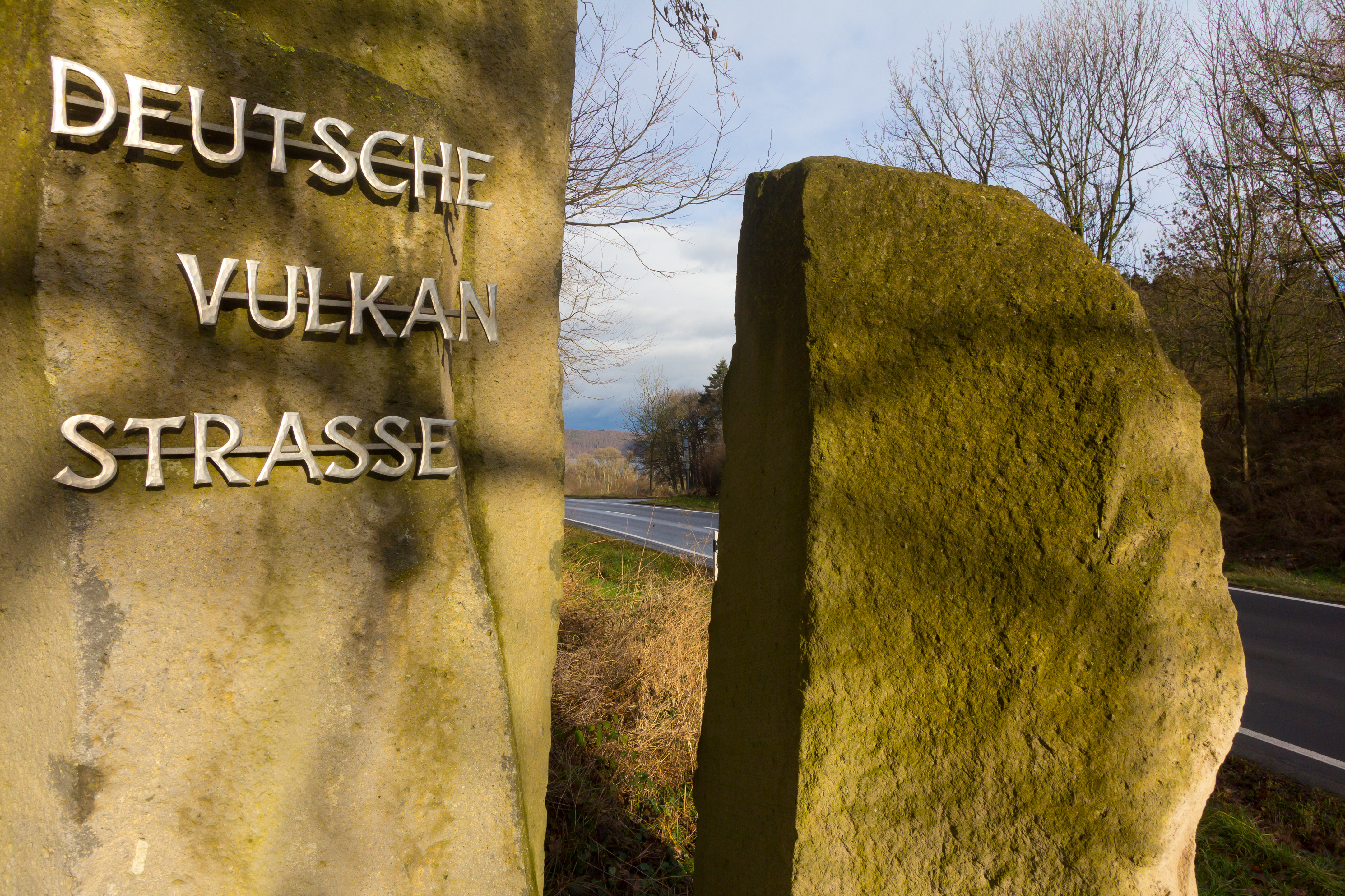 Startpunkt der Deutschen Vulkanstraße beim Laacher See